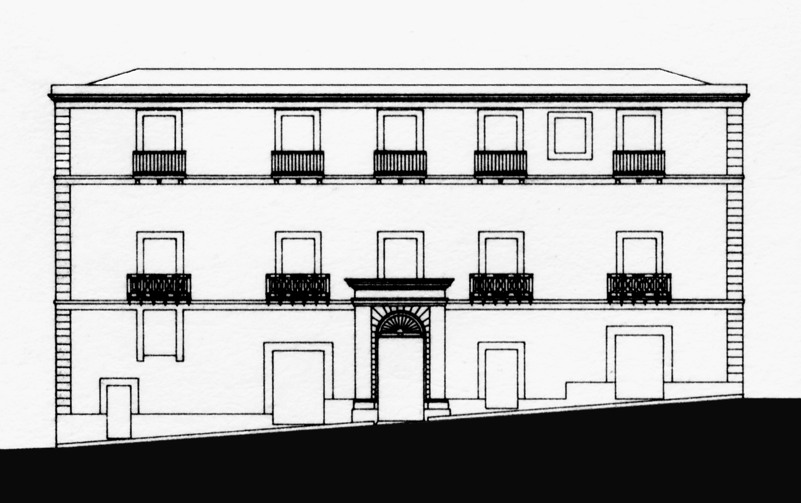 Prospetto del Palazzo Atenasio Martino dei baroni di Rocca e Valdina, sito in Cefalù (PA).